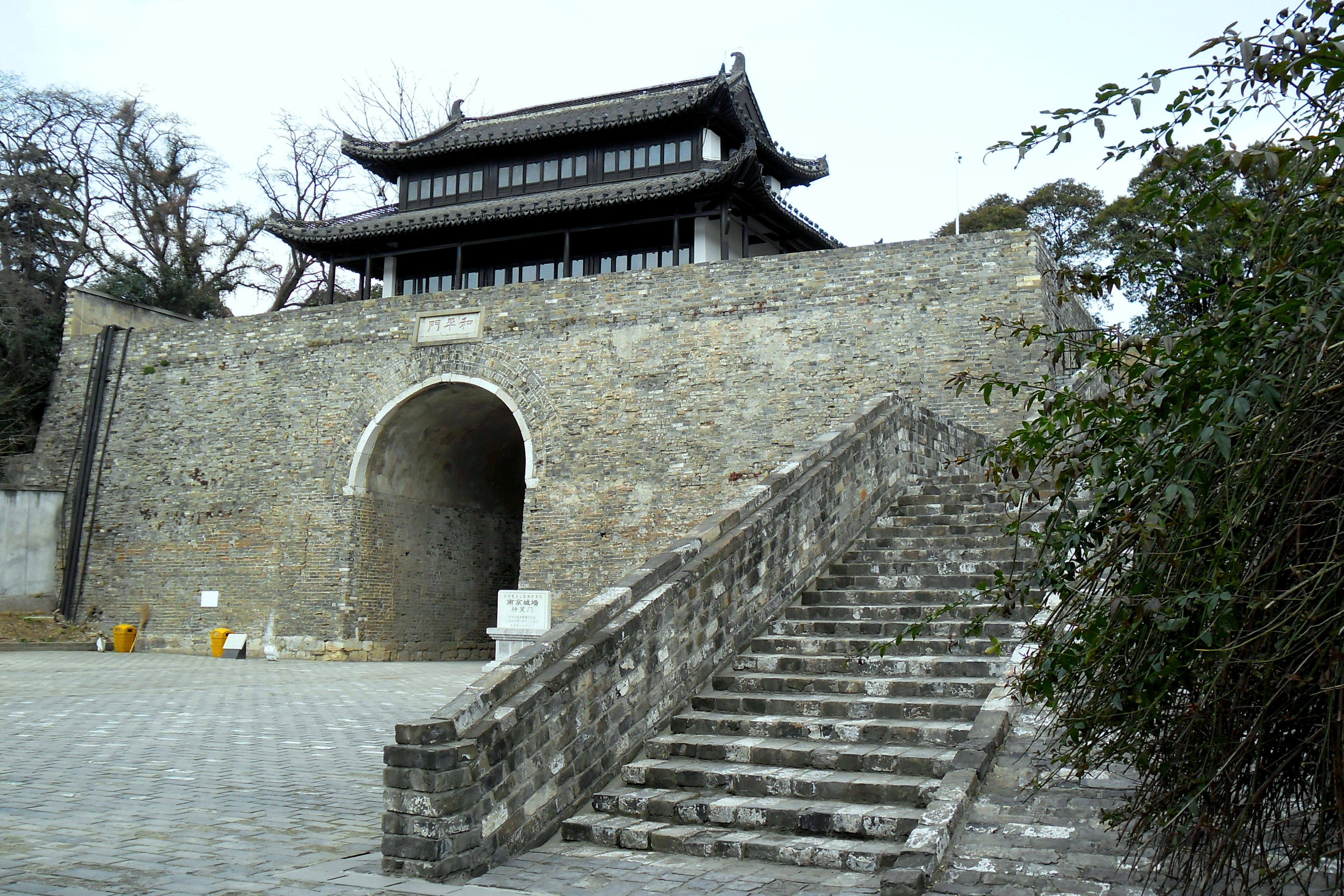 中文（中国大陆）: 江苏省南京市